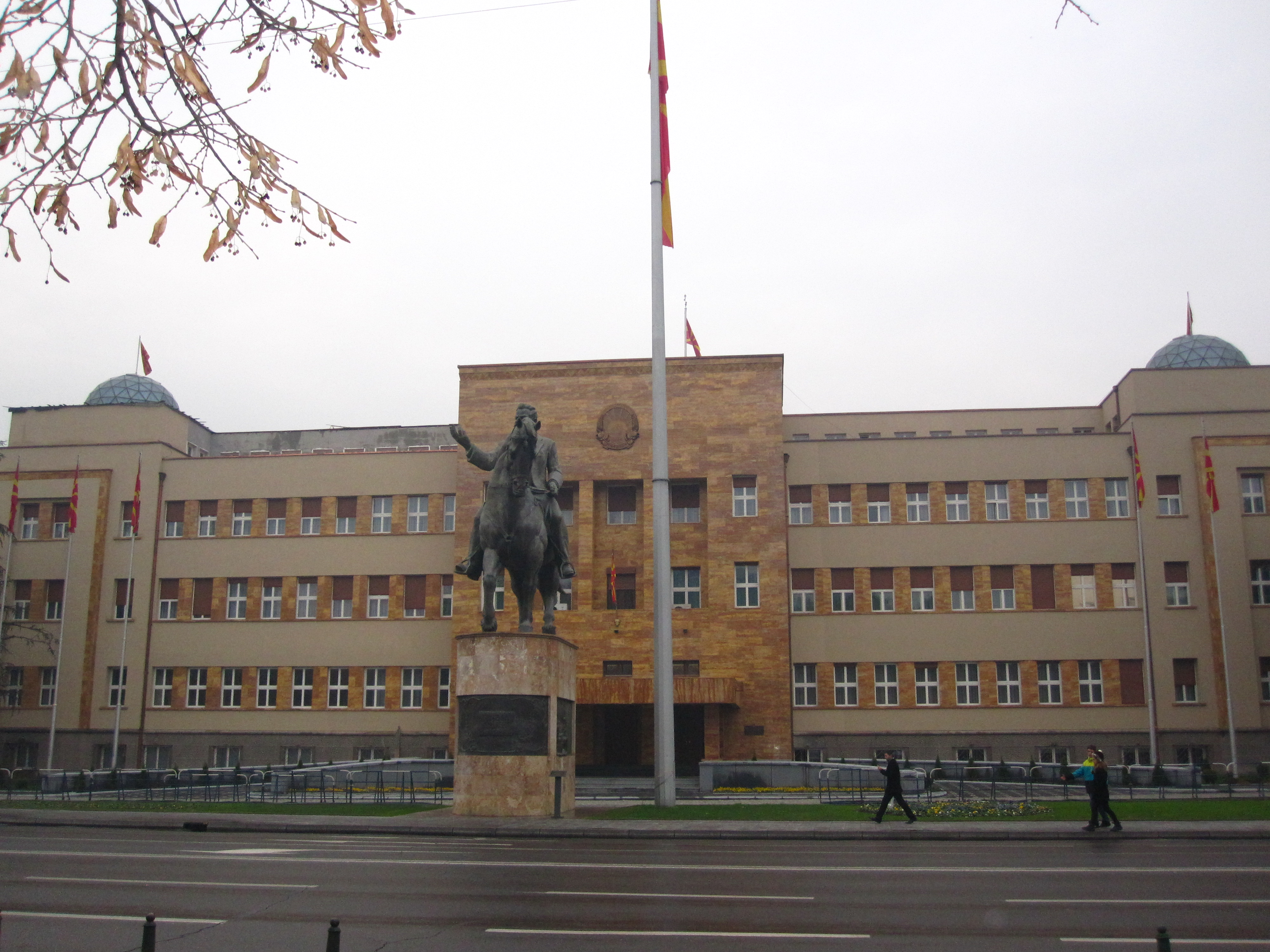 Собранието на Република Македонија и споменик на Никола Карев.